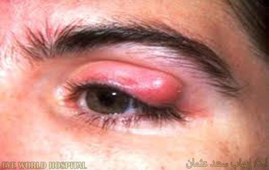 أورام الجفون